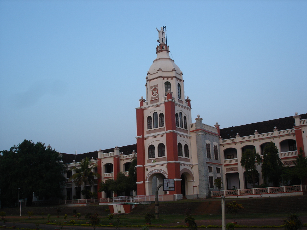 SB College, Changanassery, Kerala, India